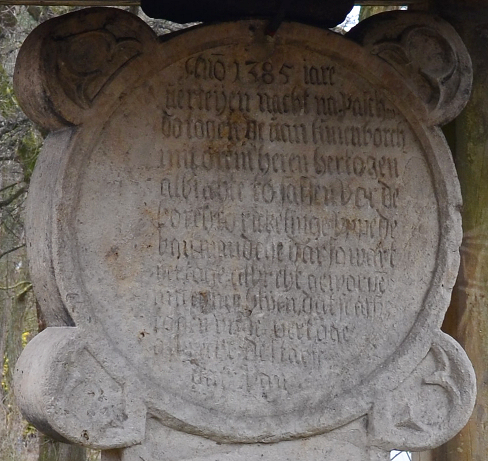 Herzog-Albrecht-Denkmal